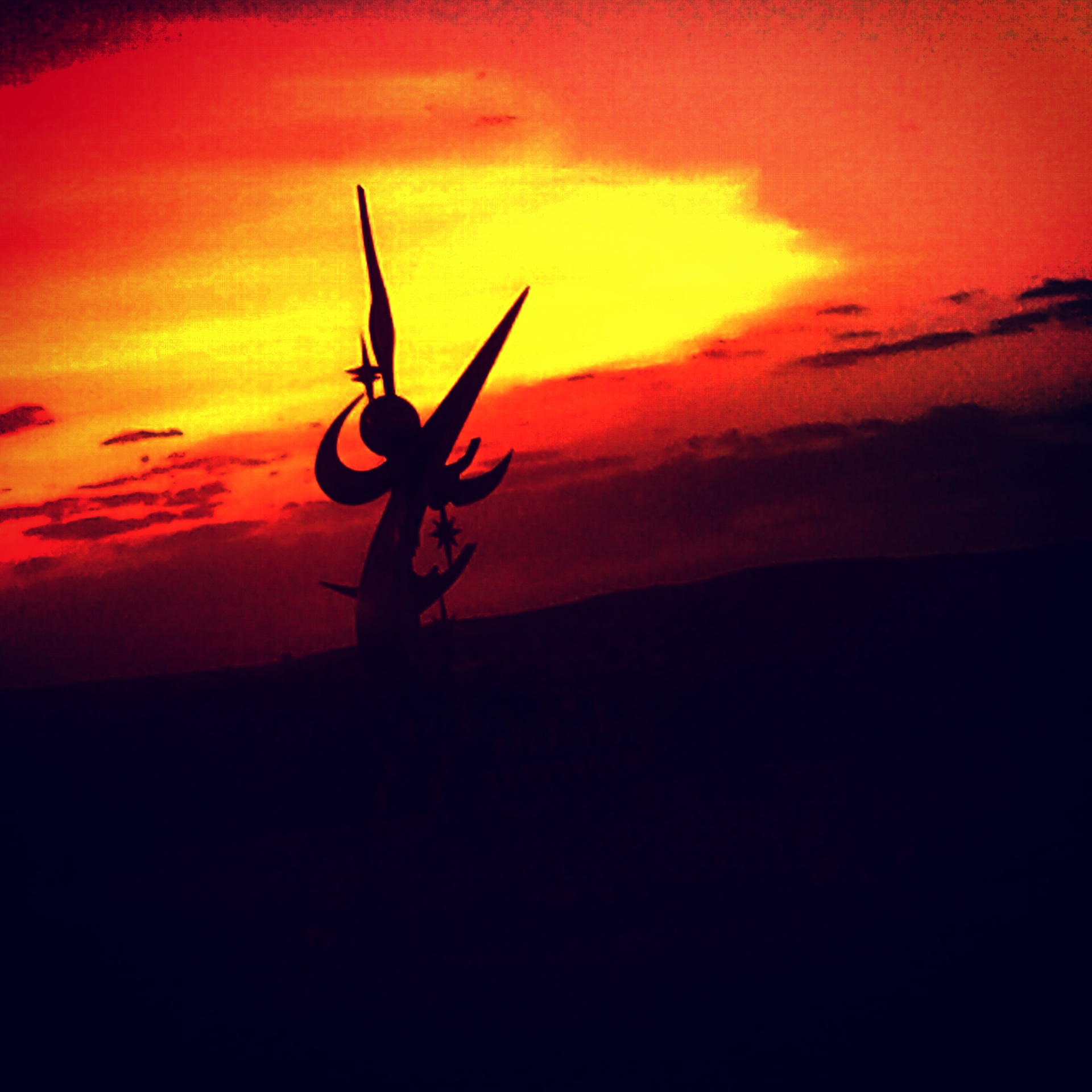 قرية سبيحة في منطقة الباحة